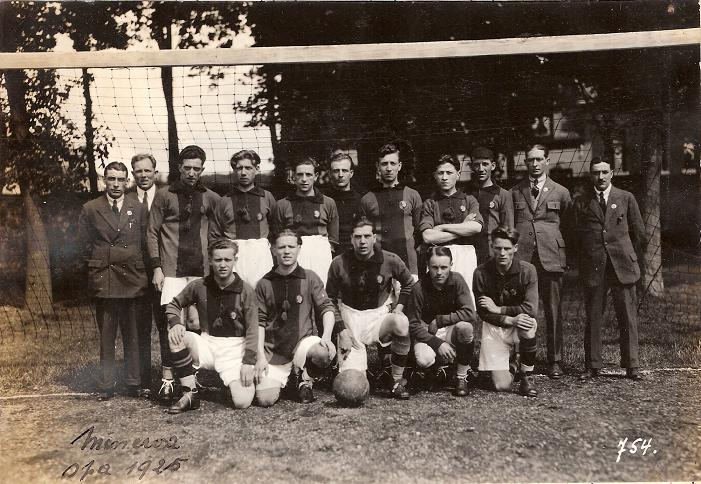 belgische voetbalploeg